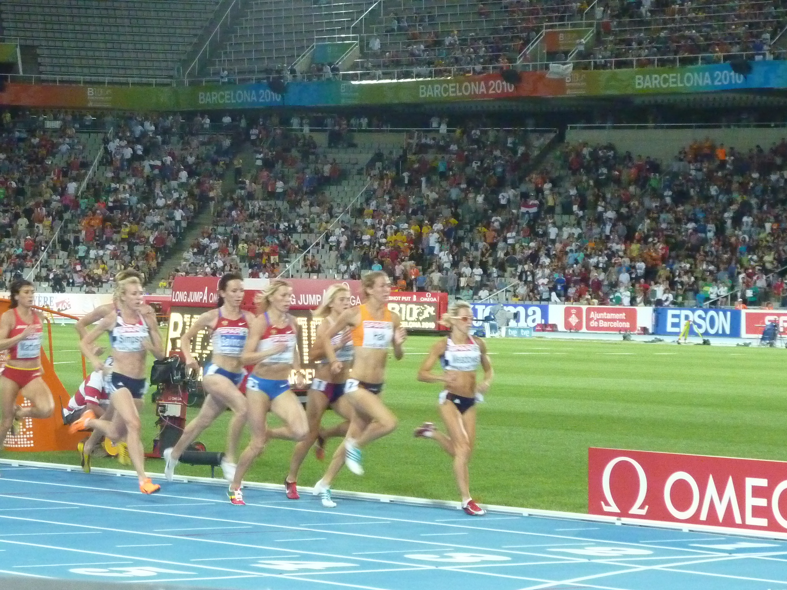 800m final